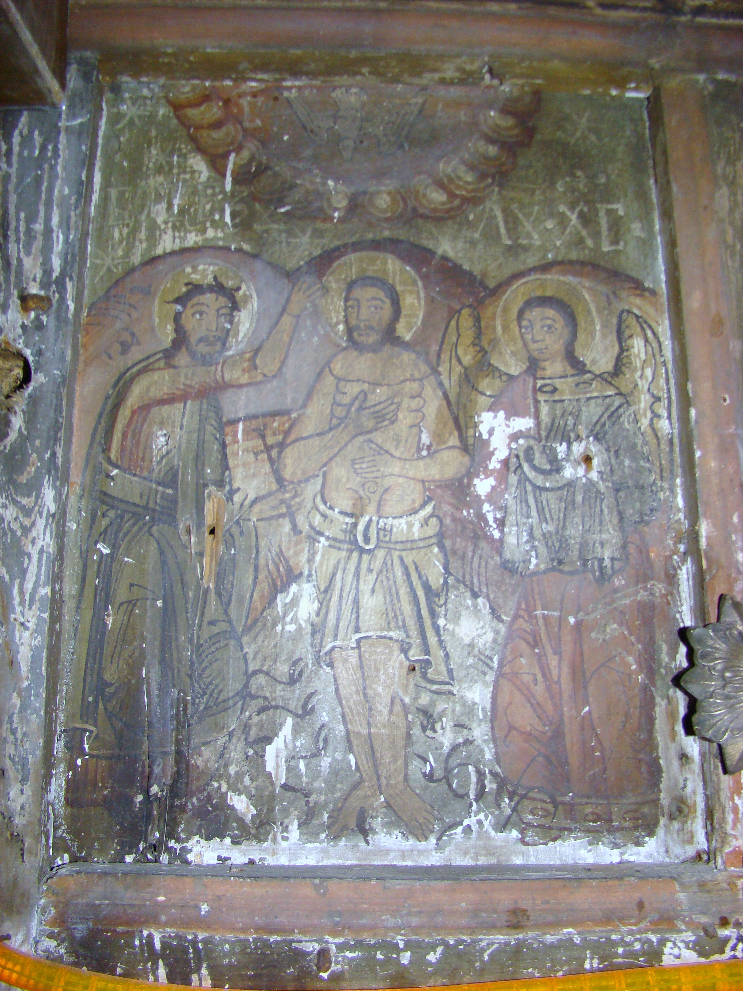 Biserica "Înălţarea Domnului" , sat NUCŞOARA; comuna SĂLAŞU DE SUS